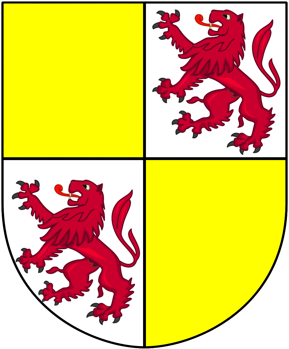 With elements by @Heralder